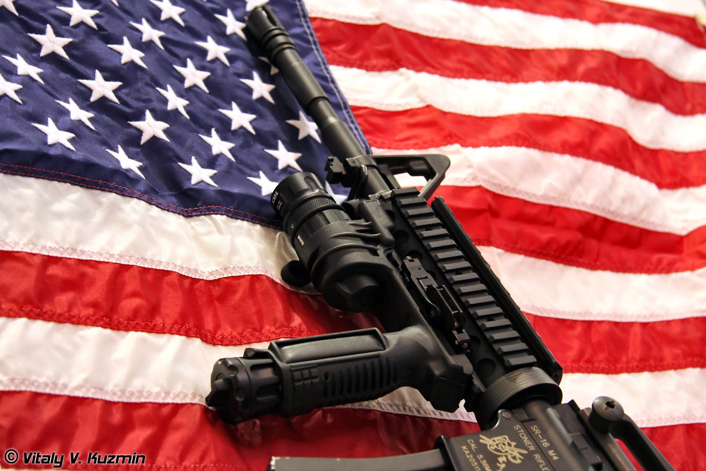 Заключительная фотография должна быть какая-нибудь необычная. Я думаю, вот эта вполне подойдет. (Last photo should be something unusual. I think this one is the most suitable)